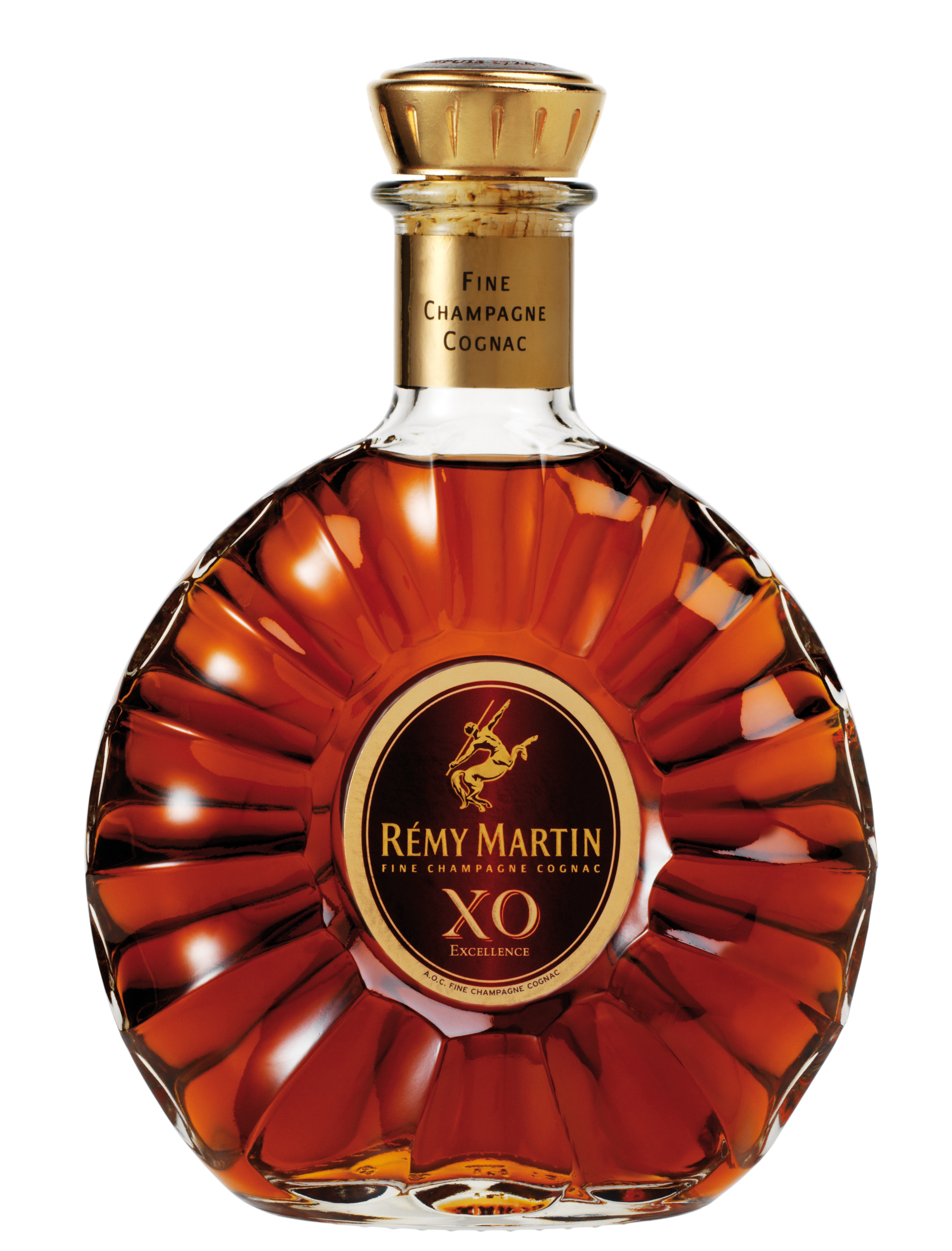 Rémy Martin XO Excellence är en av cognacindustrins mest respekterade buteljeringar. Den tillverkas uteslutande av vin från Grande Champagne och Petite Champagne, som är de distrikt som anses ge det allra förnämsta destillatet. Efter att långsamt ha destillerats två gånger i en traditionell Potstillpanna lagras eau-de-vien på fat av Limousine-ek i upp till 37 år.